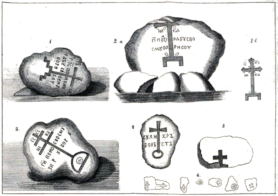 Двинские камни (по рисункам, помещённым в I т. "Трудов Первого Археологического Съезда в Москве." 1869 г.)